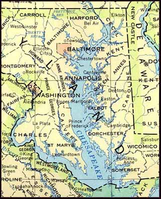 Karte der Chesaspeake Bay